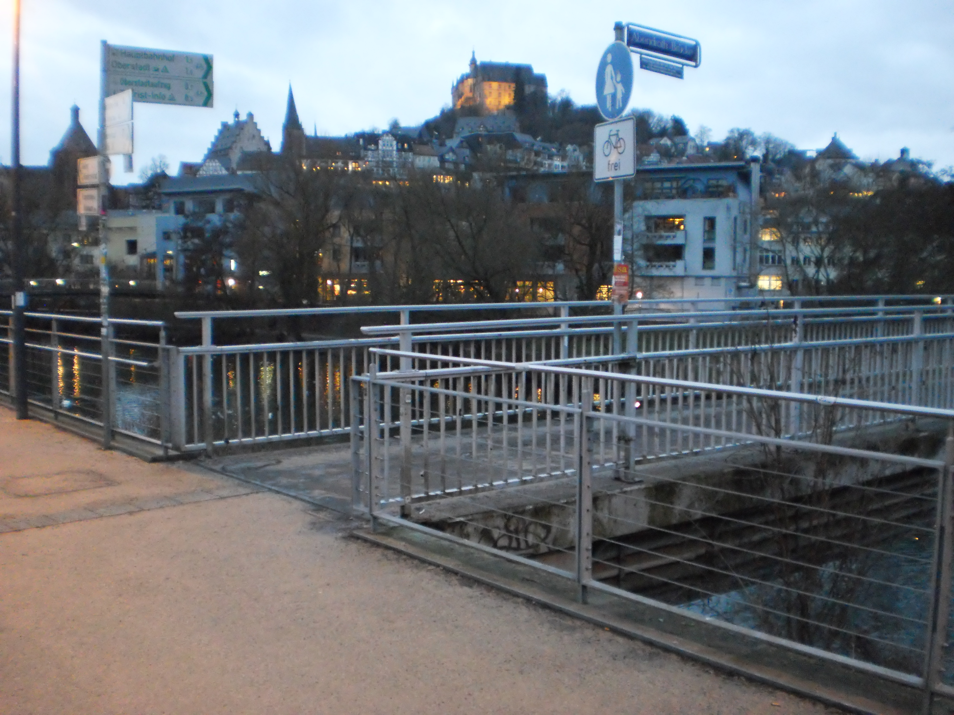 Abendroth-Brücke mit Abend-Grauen zur graublauen Stunde vom Lahntalradweg (Brücke über die Lahn von der Uni-Mensa Marburg in die Innenstadt Richtung Biegenstraße). Benannt nach Wolfgang Abendroth (WP-Artikel). Oben das Schloss, vor der Brücke einer der Wegweiser für den Radverkehr in Hessen (hinter dem Link sind weitere!), vor allem nach Süden (35 km bis Gießen und nicht allzuweit Weidenhäuser Brücke und 0,8 km zur Jugendherberge in Weidenhausen, 1,0 km in die Oberstadt und zur Touristeninformation, nach Norden Richtung Biedenkopf. 2017-01-12.